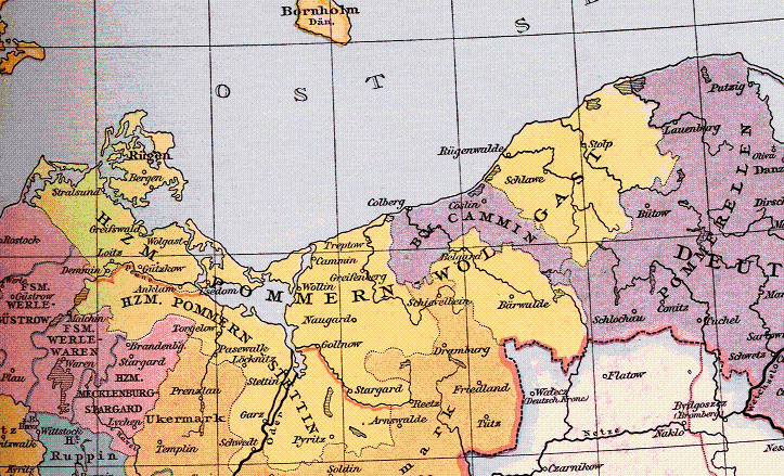 Bistum Cammin um 1400